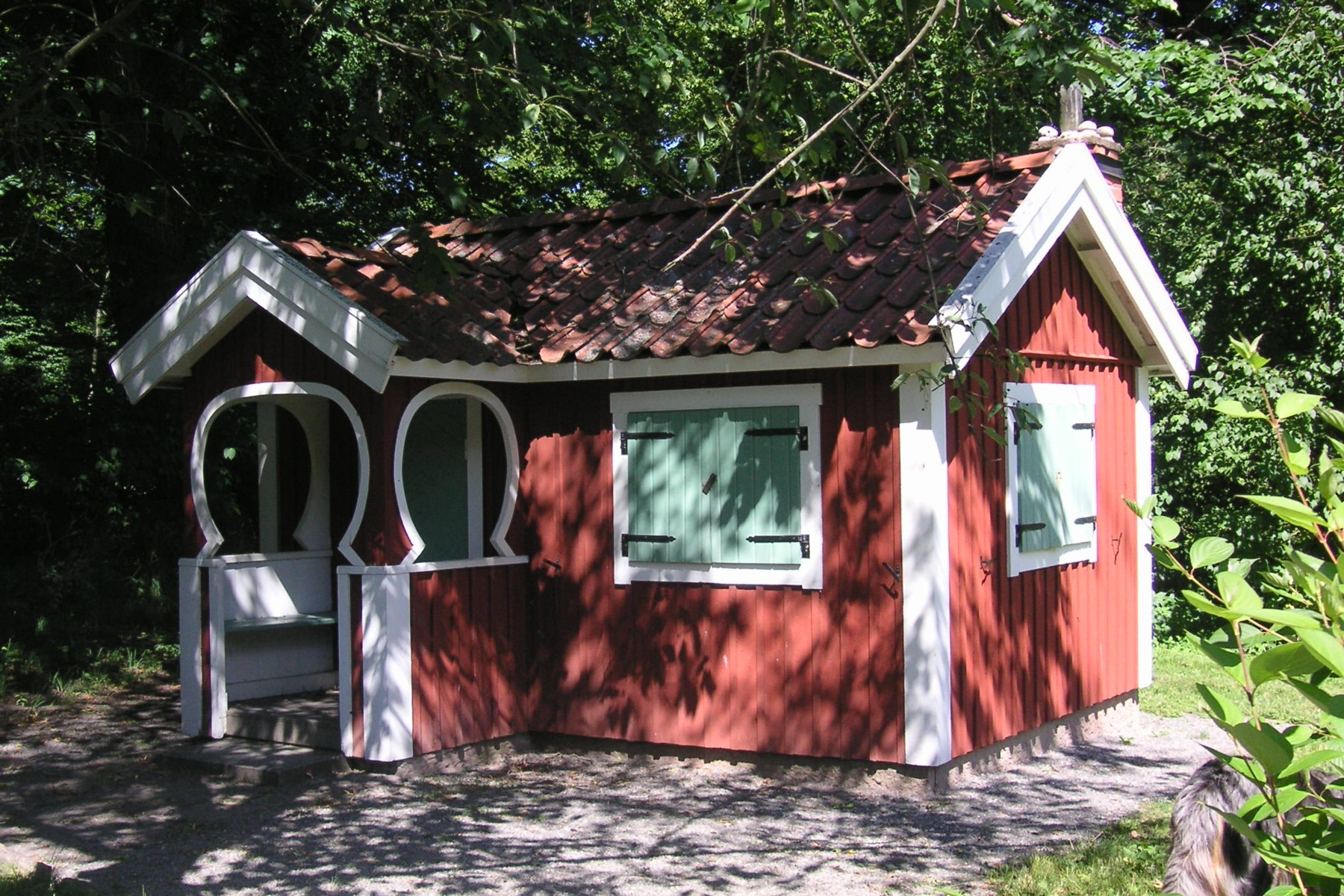 Hagasessornas lekstuga intill Haga slott